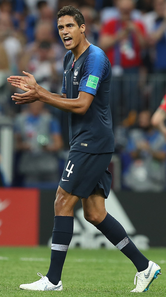 Уилл Смит, Гризманн, Модрич и кубок мира - в Москве прошёл финал ЧМ-2018